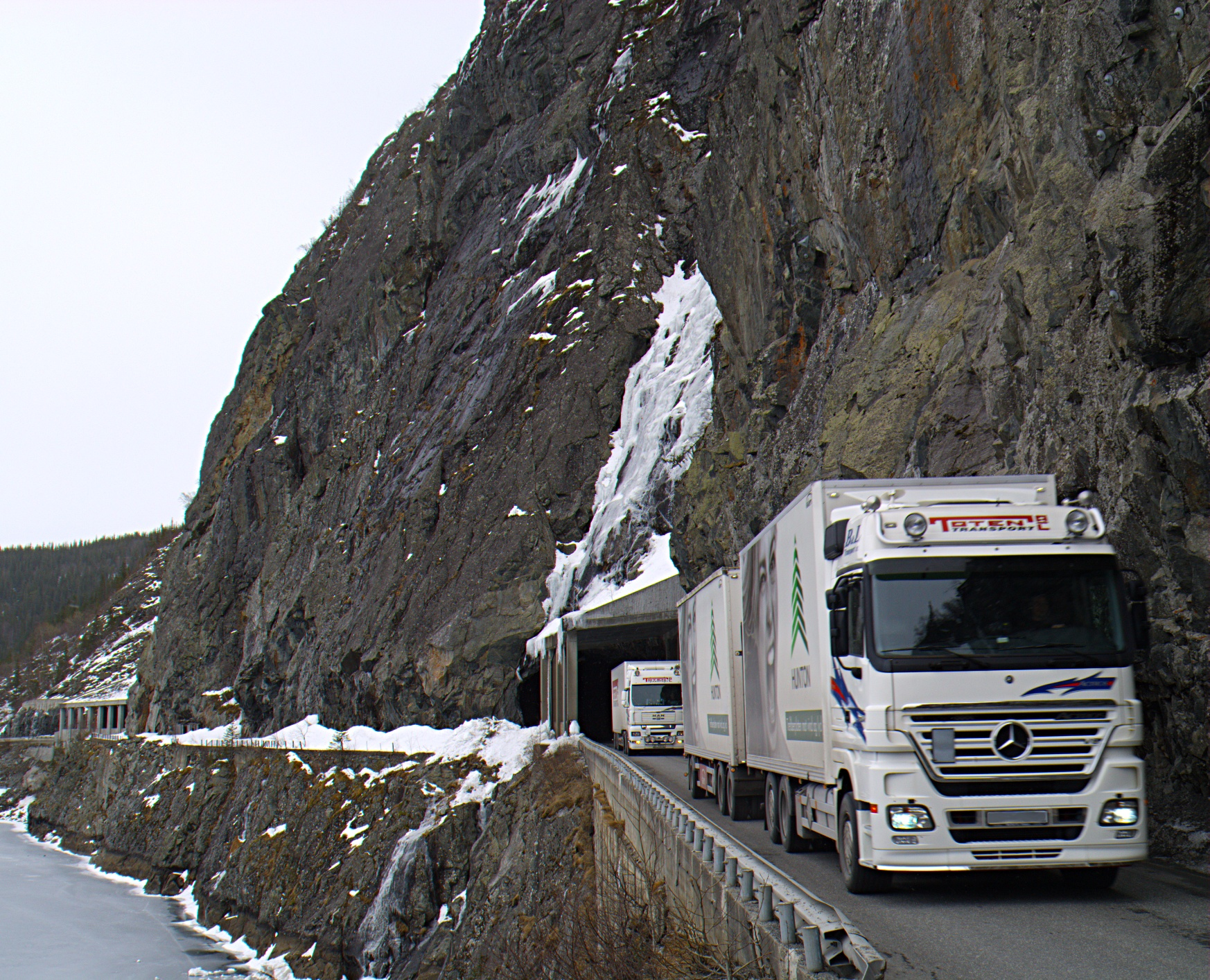 Kvamskleiva, Vang kommune